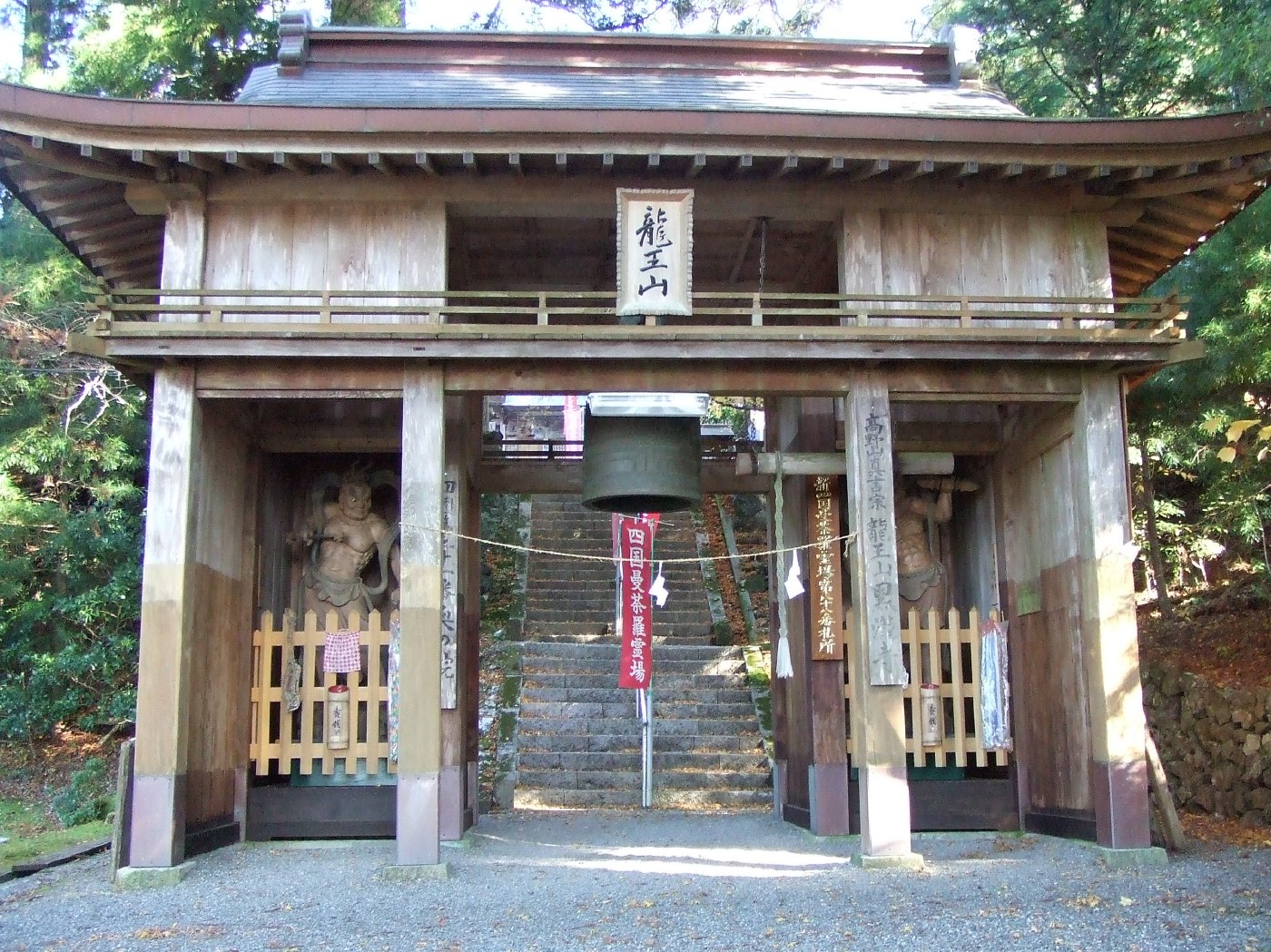 黒滝寺の仁王門